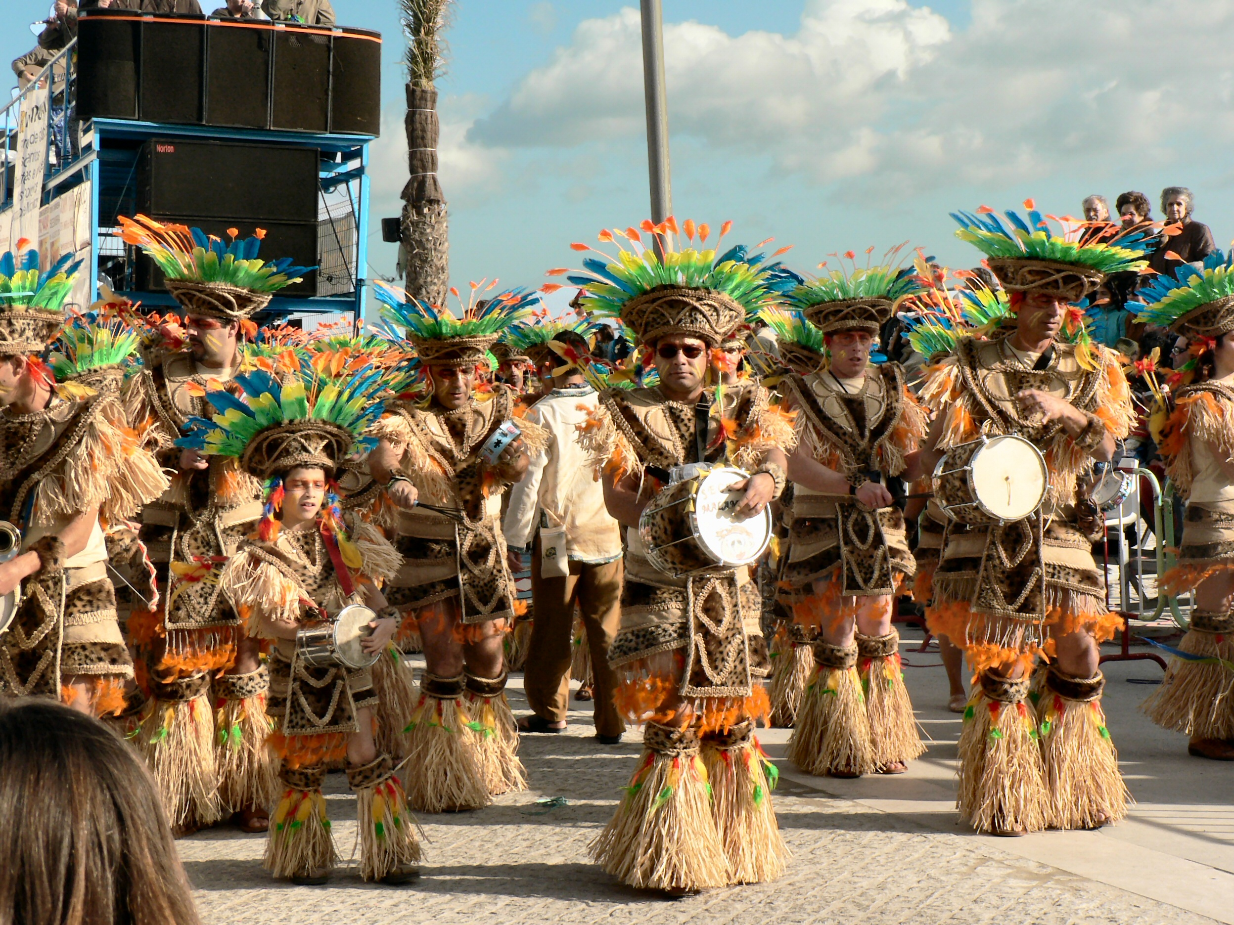 Desfile de Carnaval em Sesimbra 2007